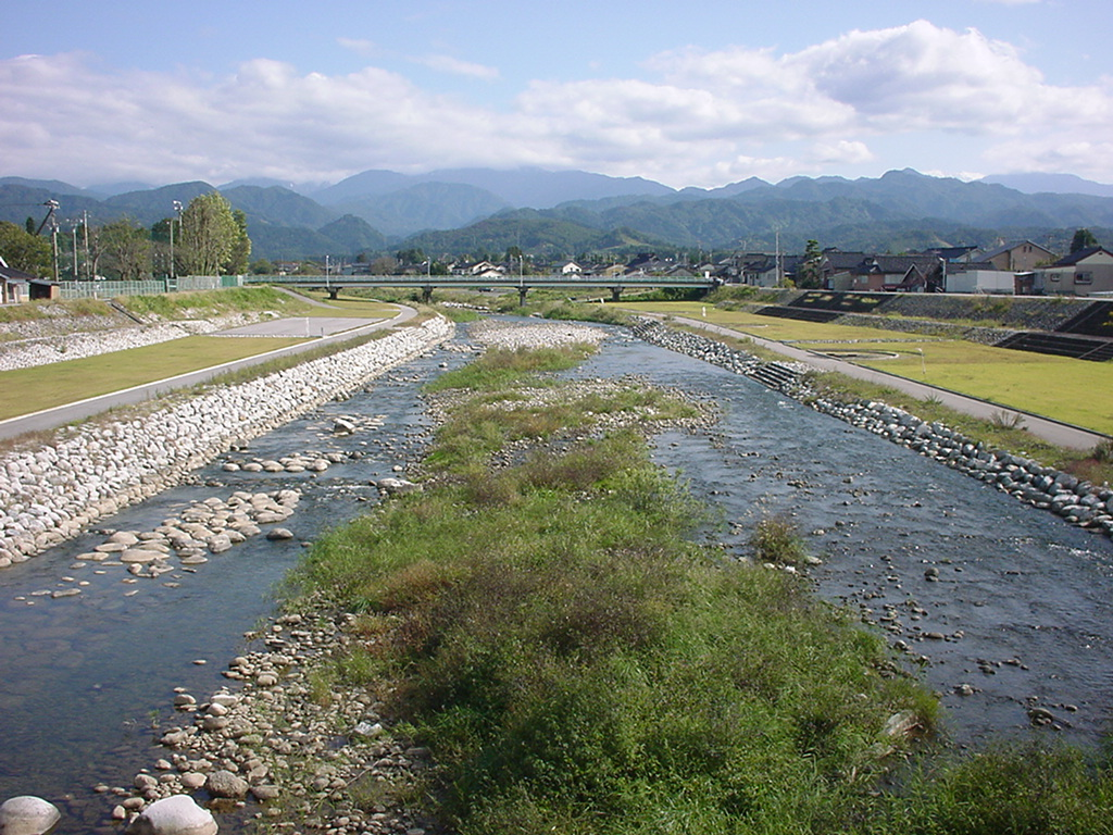 Kamiichi River in Toyama, Japan. ja: 上市川（富山県中新川郡上市町石浦町 白竜橋（はくりゅうはし）より上流方向撮影）